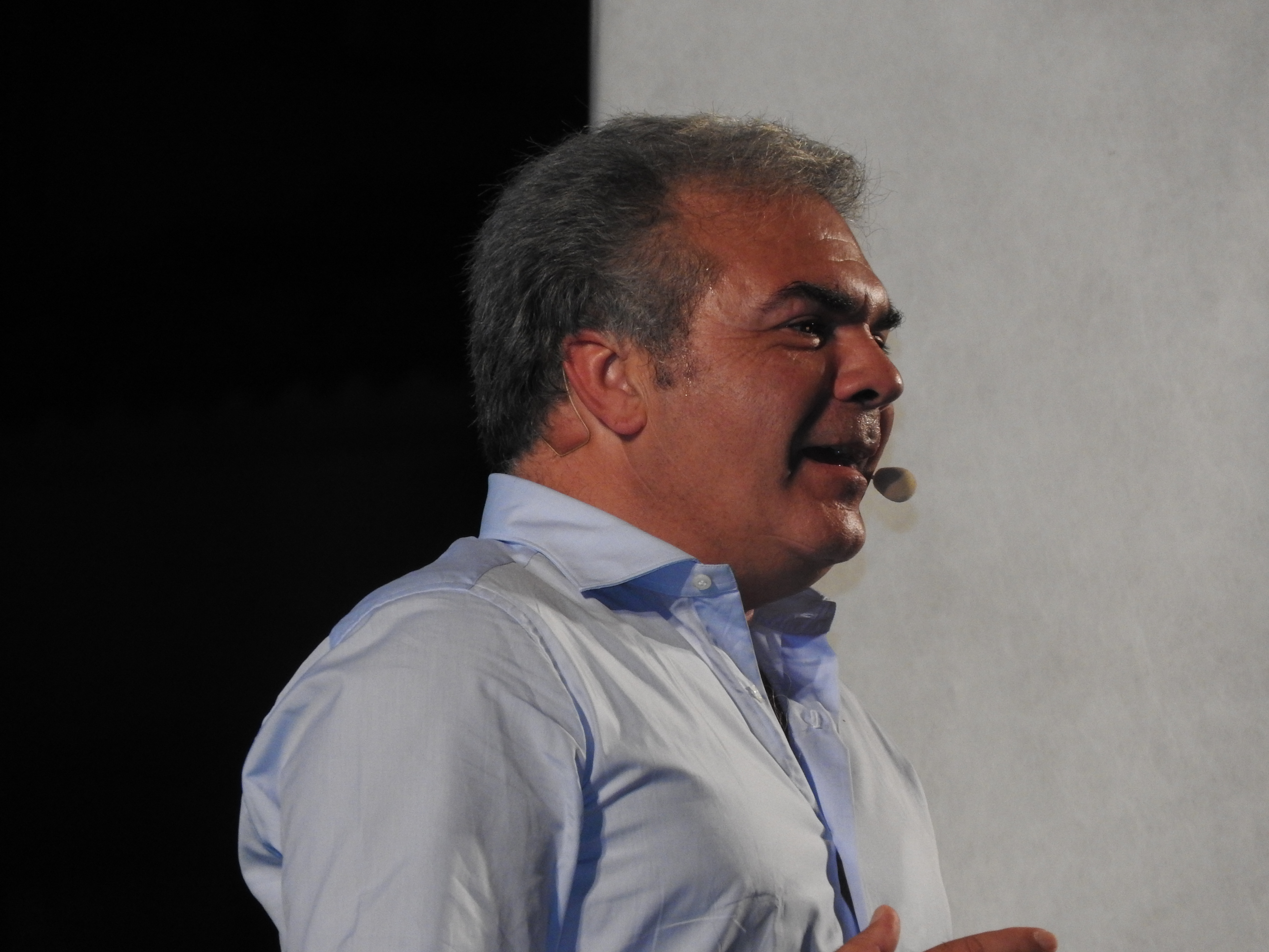 il comico, cabarettista e personaggio televisivo Franco Neri a Campora San Giovanni in un primo piano